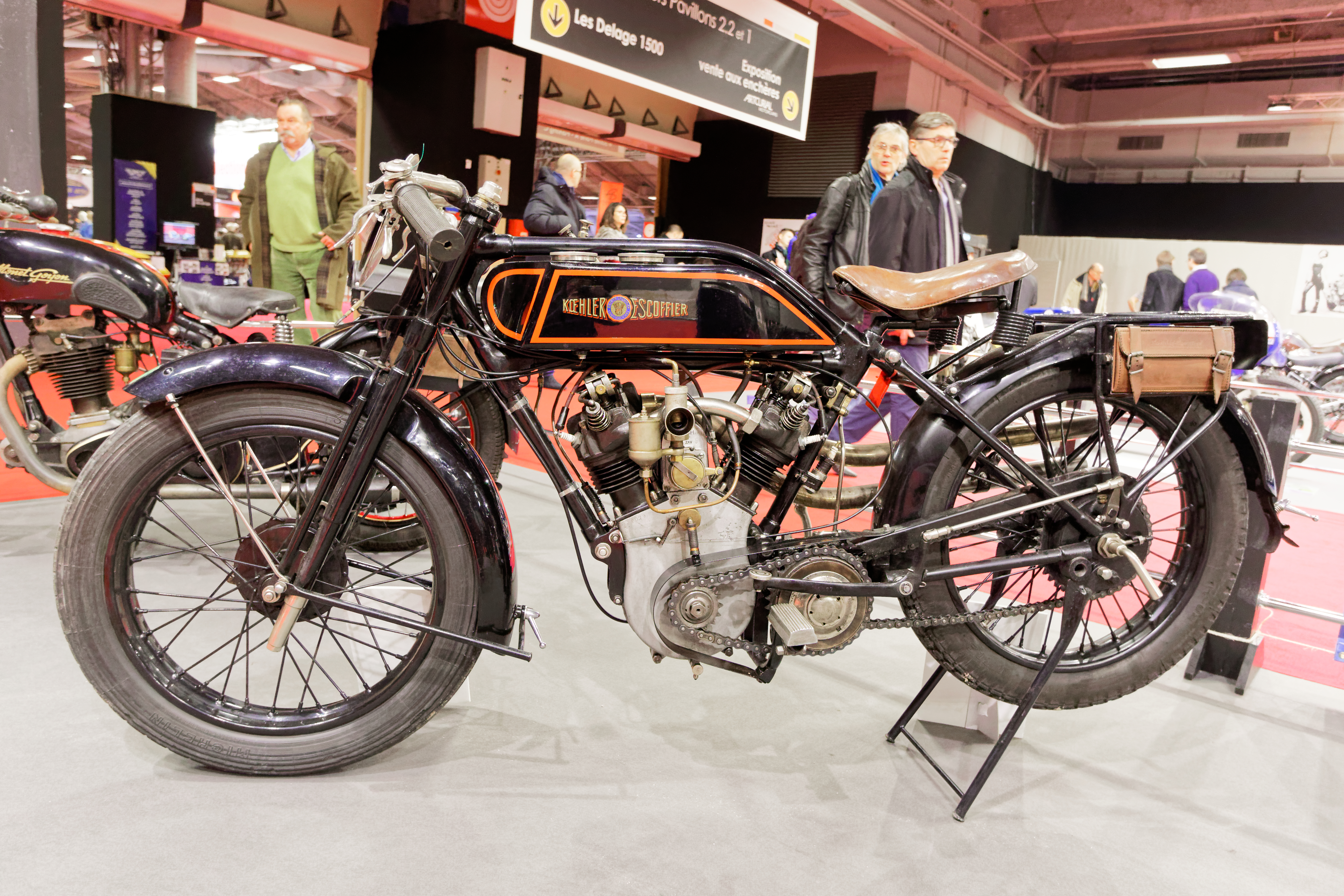 Une Koehler-Escoffier Mandoline de 1928 exposée lors du salon Rétromobile 2017.